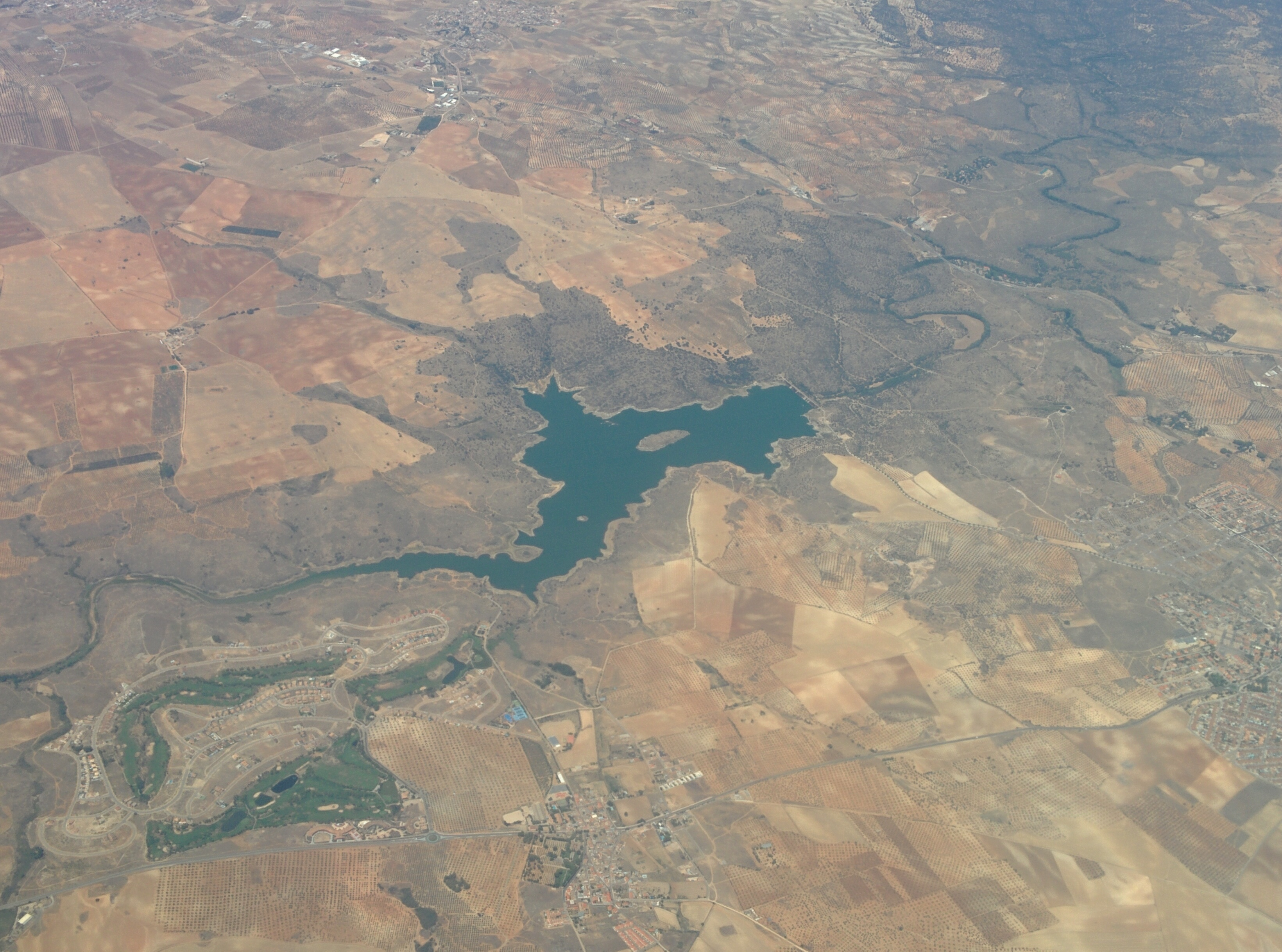 Vista aérea del embalse de Guajaraz, en Toledo (España).